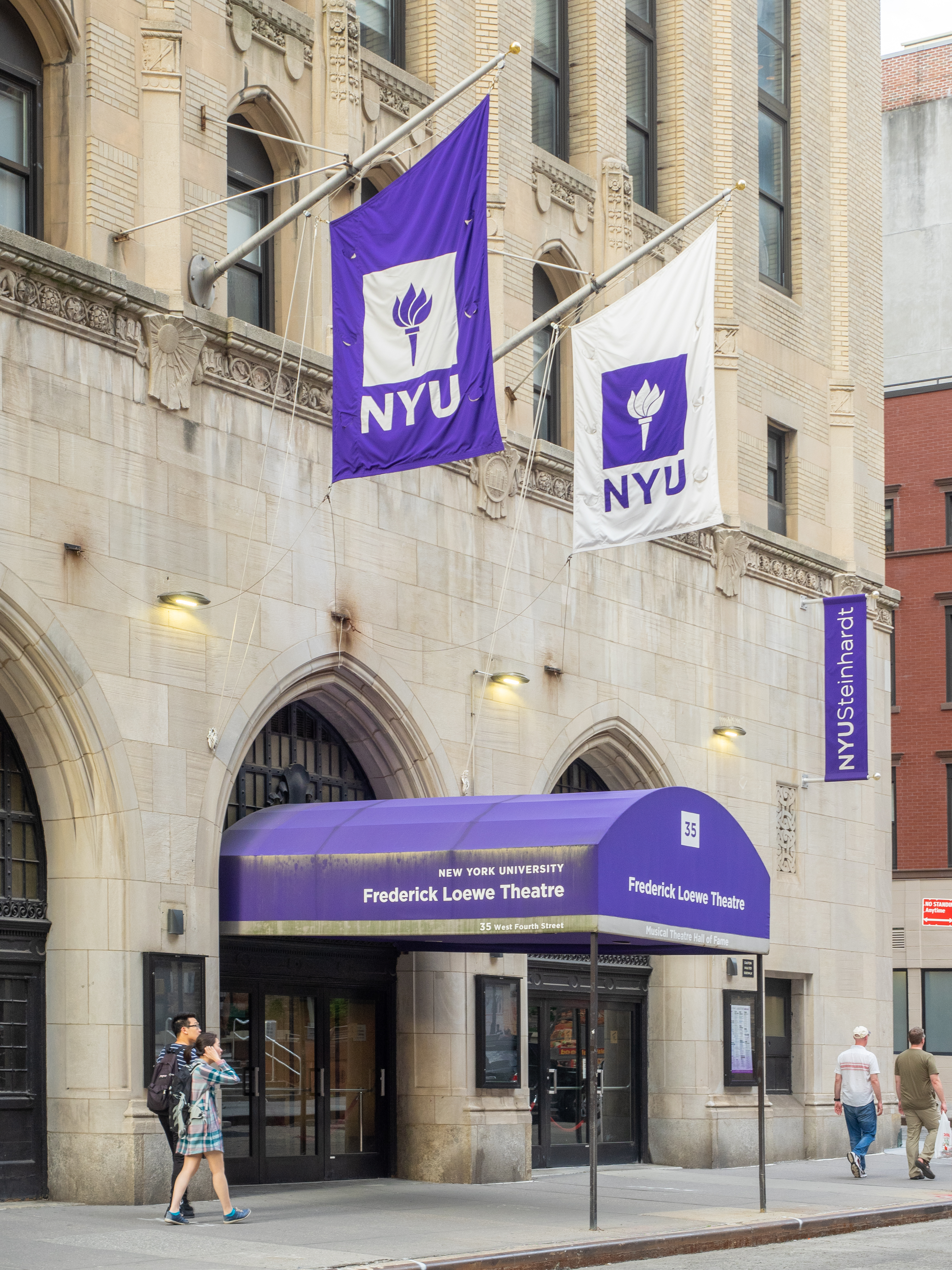 NYU, Greenwich Village, NYC